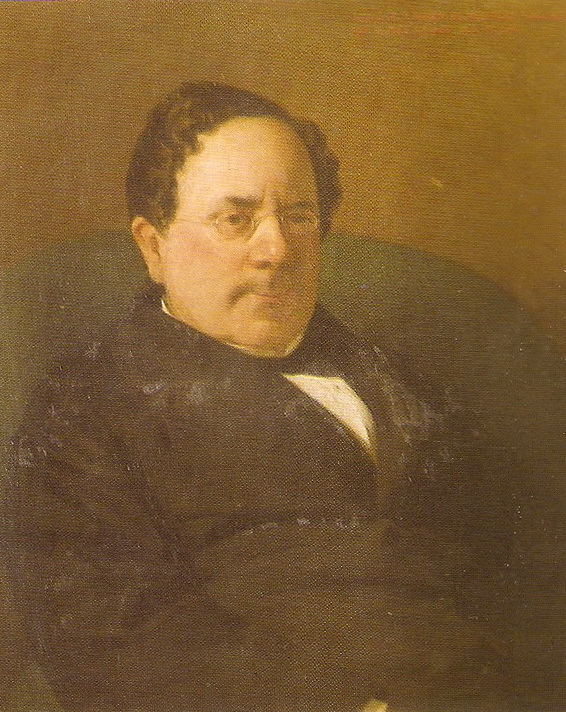 Retrato del escritor Ramón de Mesonero Romanos (1803-1882).